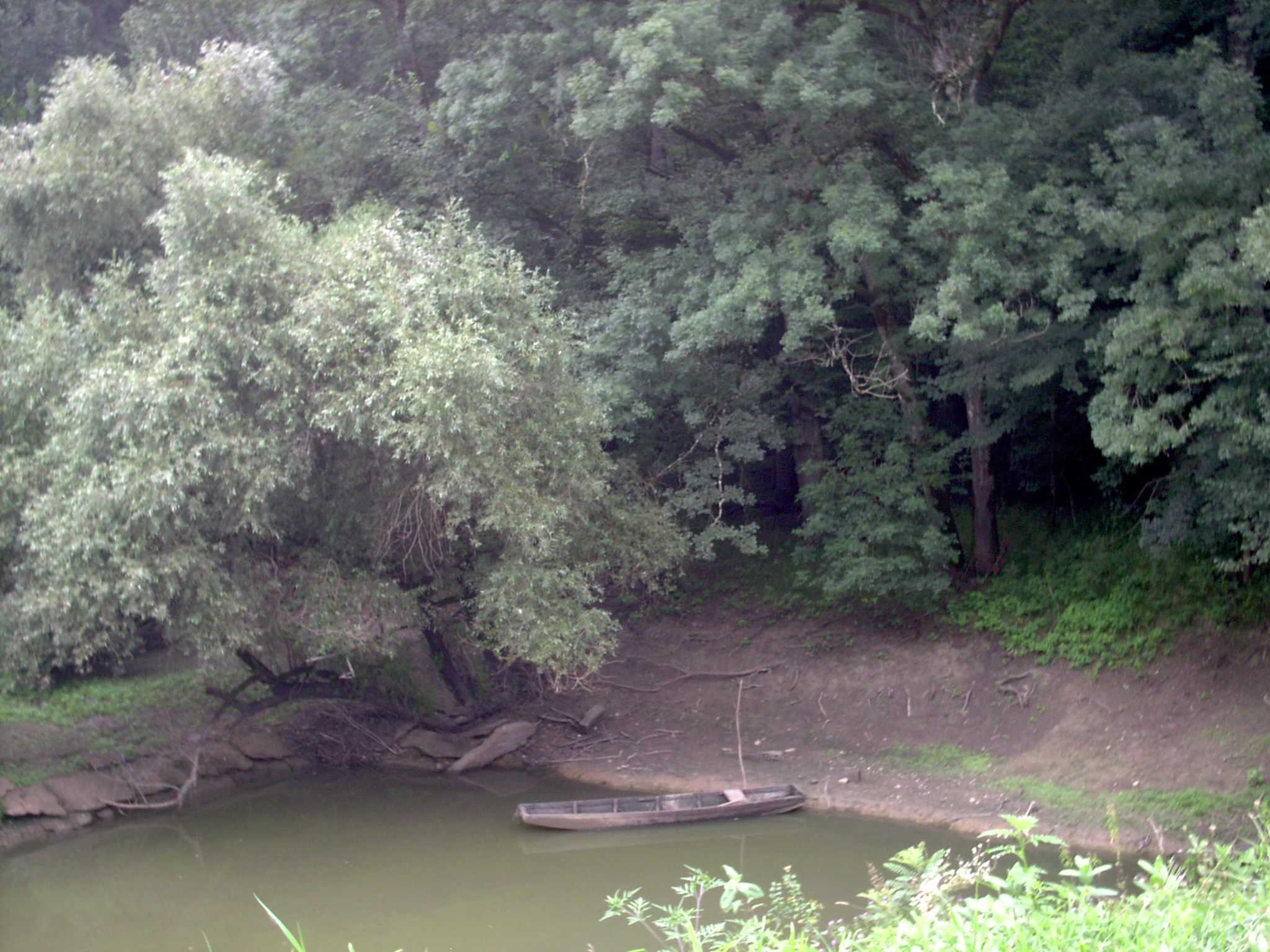 Naturpark Lonjsko polje, Brod-Posavina, Kroatien Benutzer: Pigpanter Bild selbst fotografiert